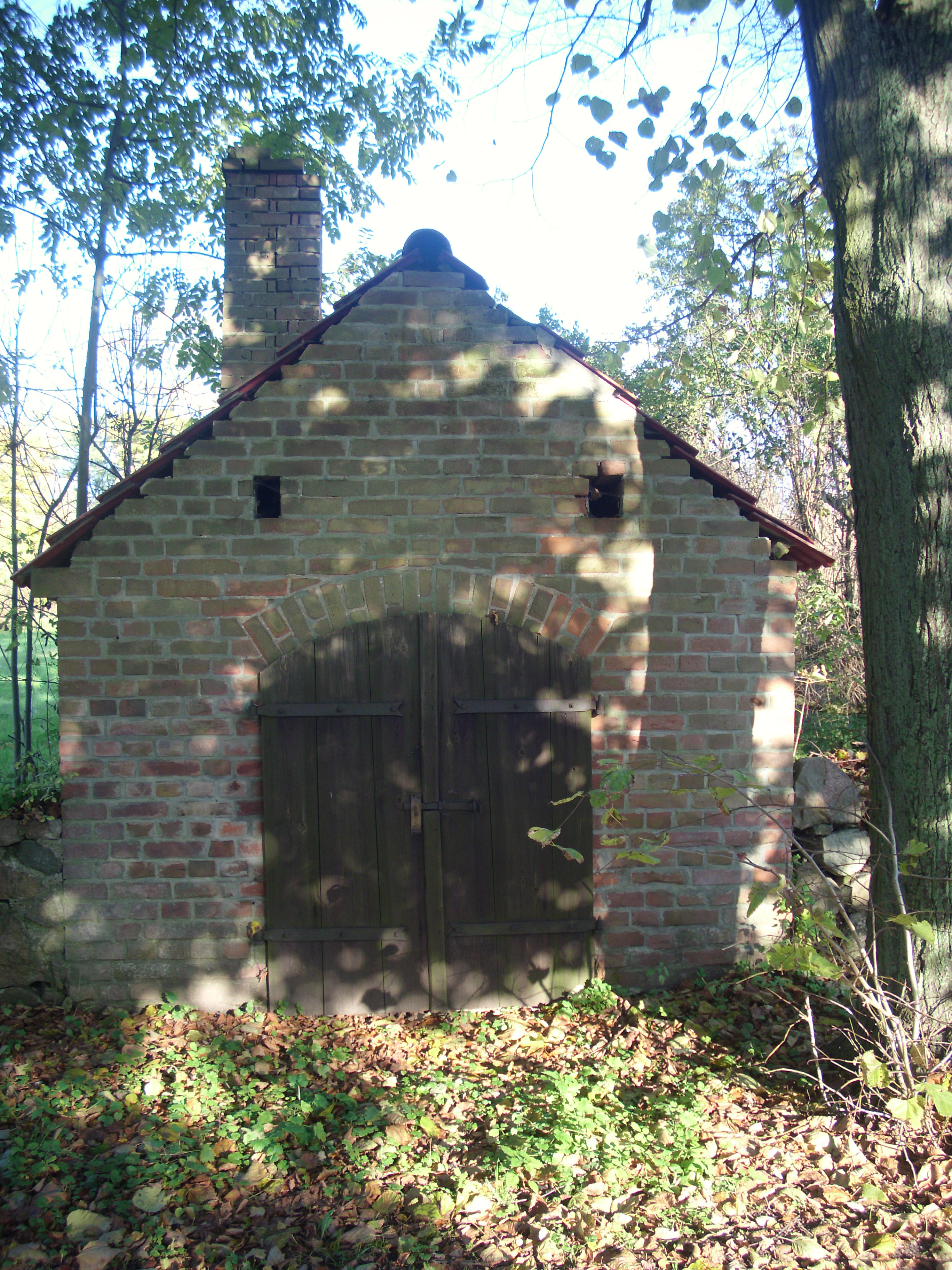 Backhaus Reicherskreuz, Naturpark Schlaubetal, Brandenburg